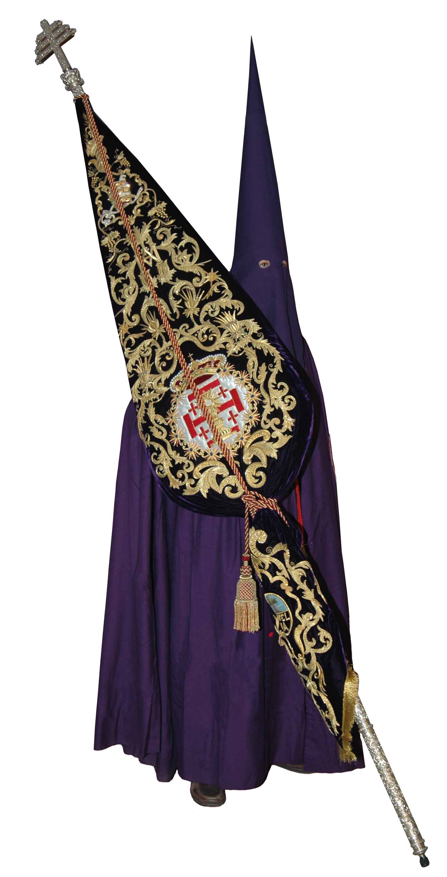 Guión corporativo de la cofradía